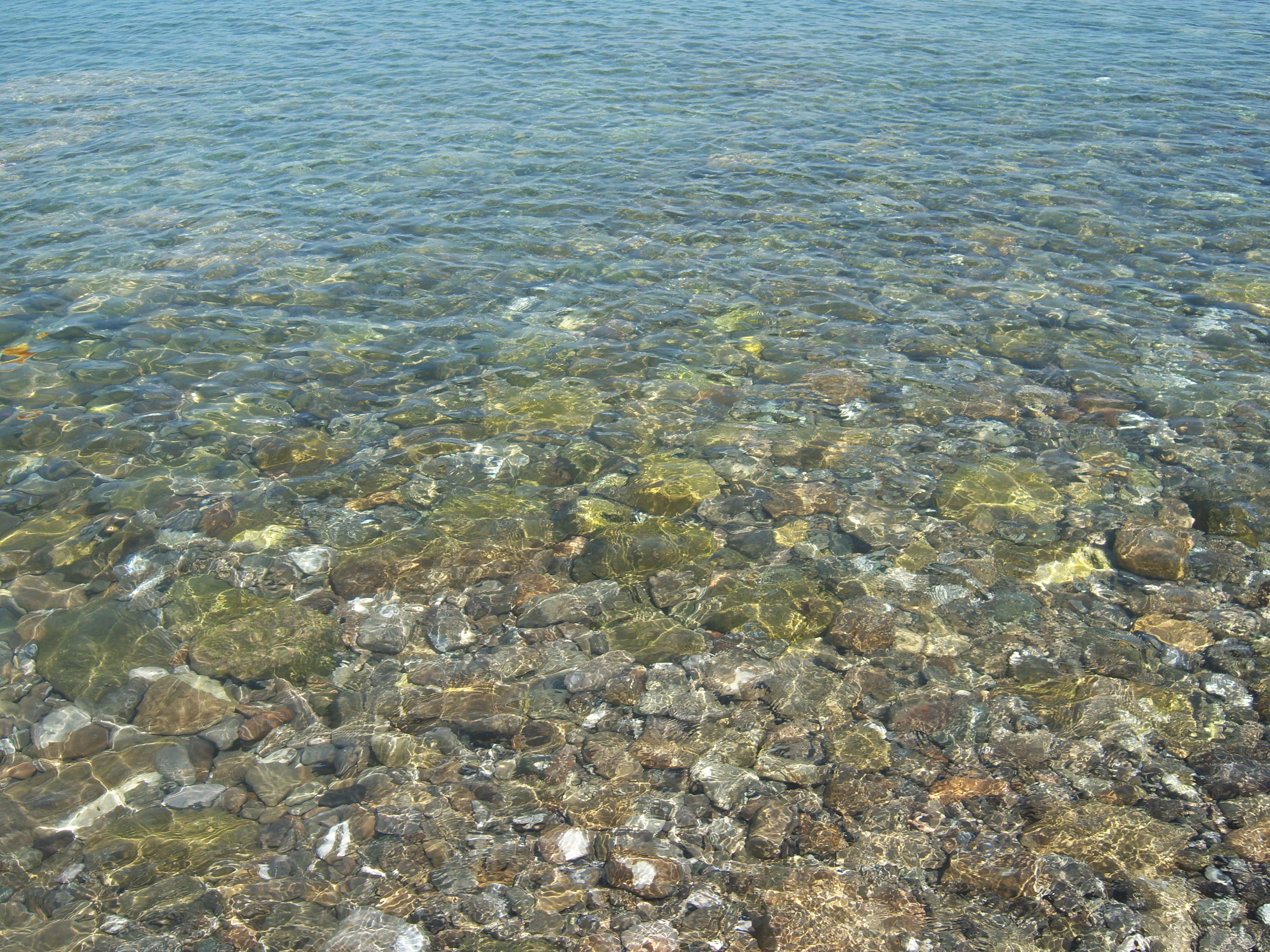 autore andrea bignardi Costa Rosetana